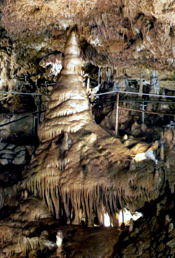 Teufelshöhle bei Pottenstein, Baum im Riesensaal